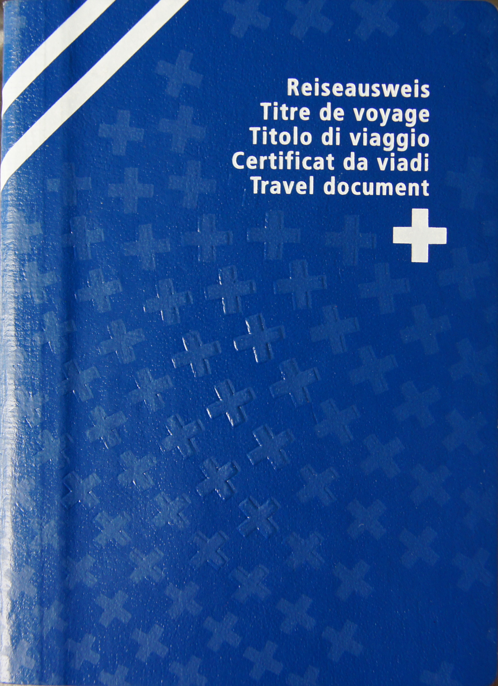 Reiseausweis für Flüchtlinge, Schweiz